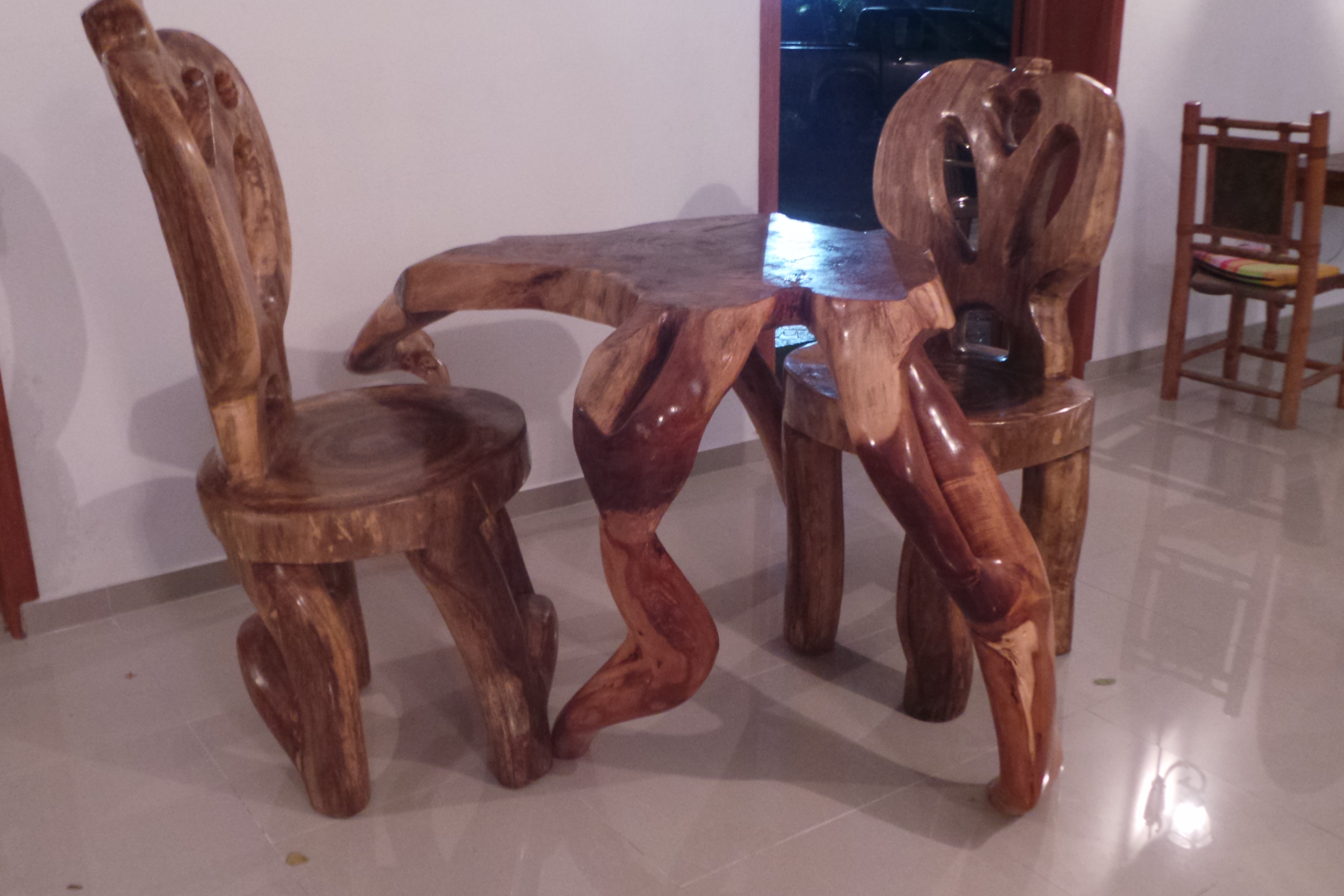 ajout d’images sur Haïti